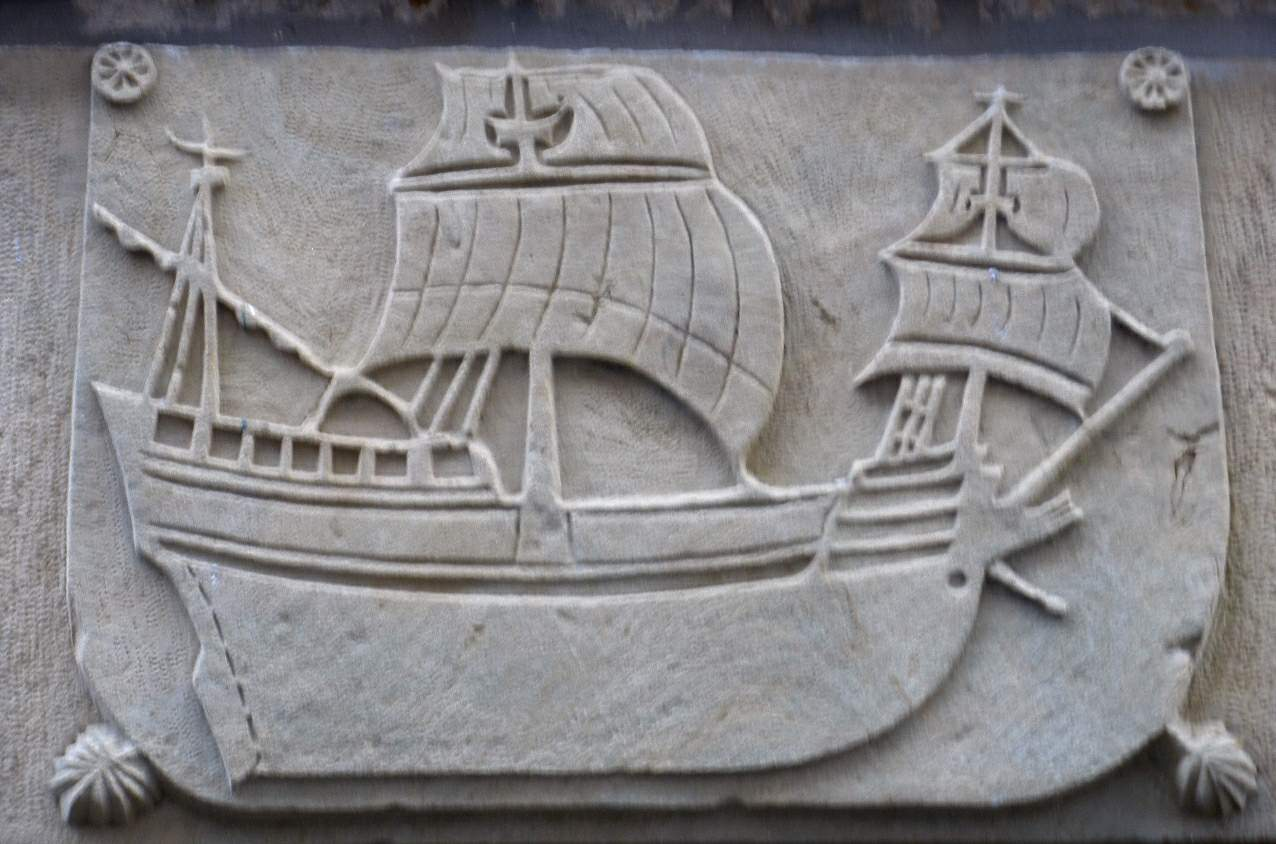 Orio (Gipuzkoa)